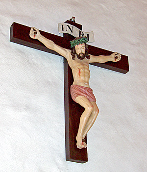 Saksild Kirke - Krucifiks Hads Herred, Århus Amt, Denmark